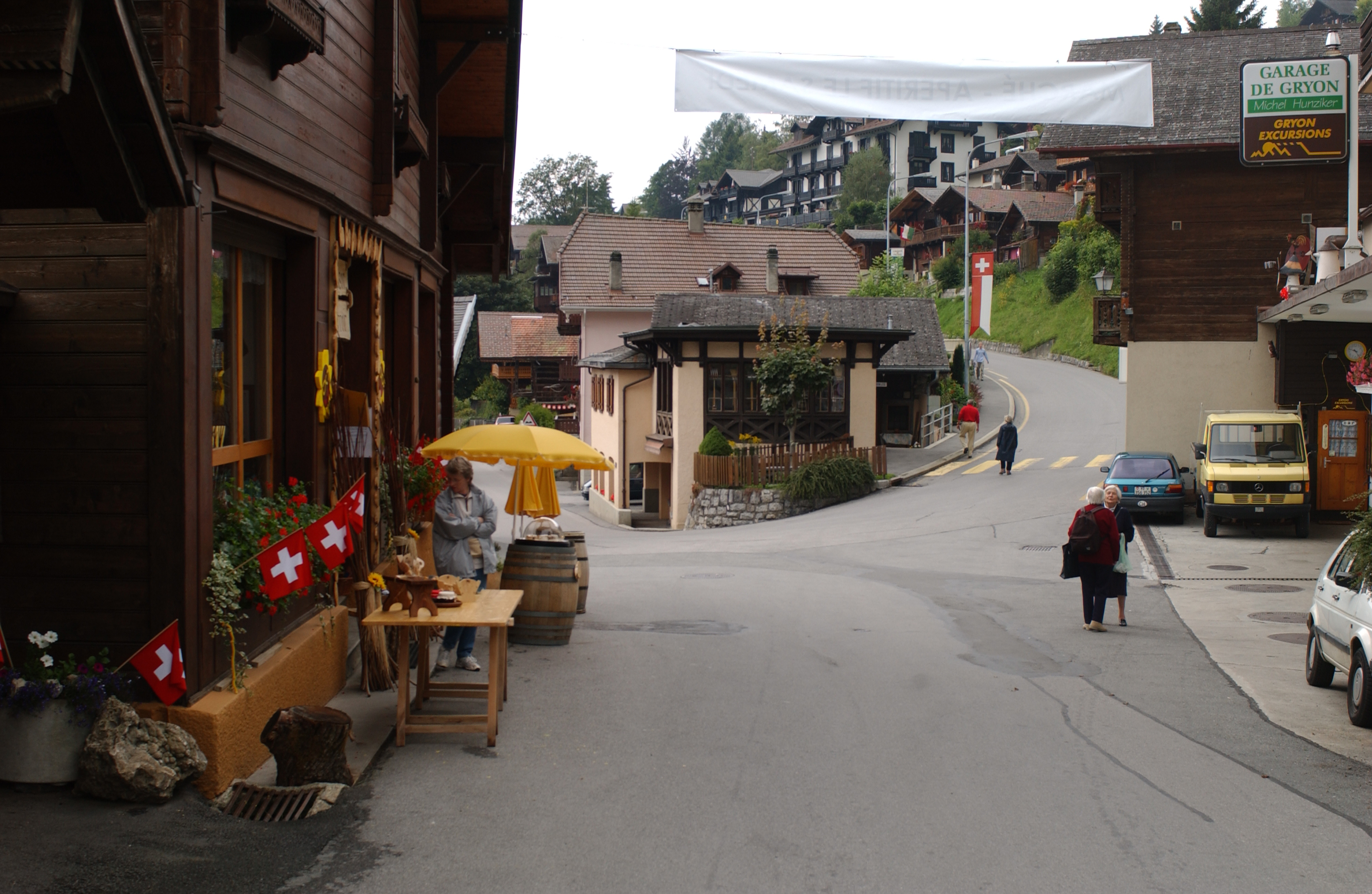 Vue de Gryon (Vaud).